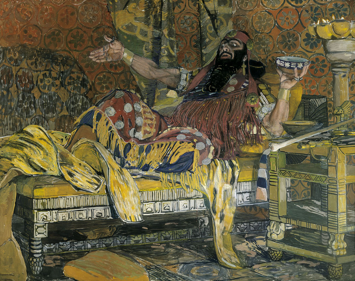 Головин Александр. Портрет Федора Шаляпина в роли Олоферна в опере Серова «Юдифь». 1908